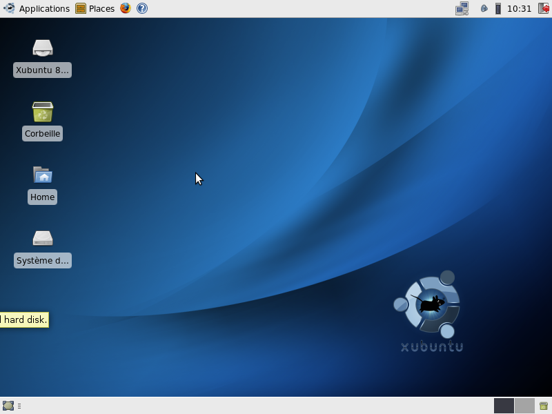 Premier écrans après Installation